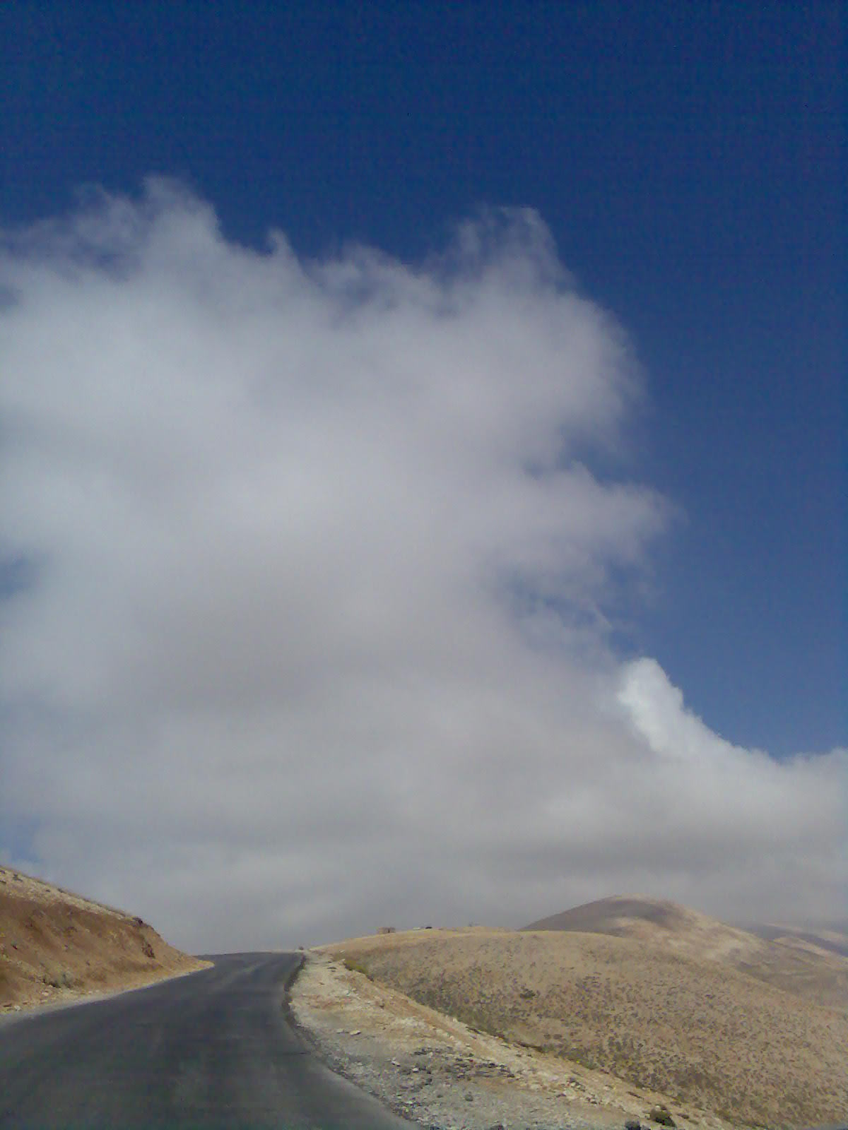 photo prise sur les routes des montagnes ouestes du Liban (mais désolée, je ne me souviens pas où précisément)